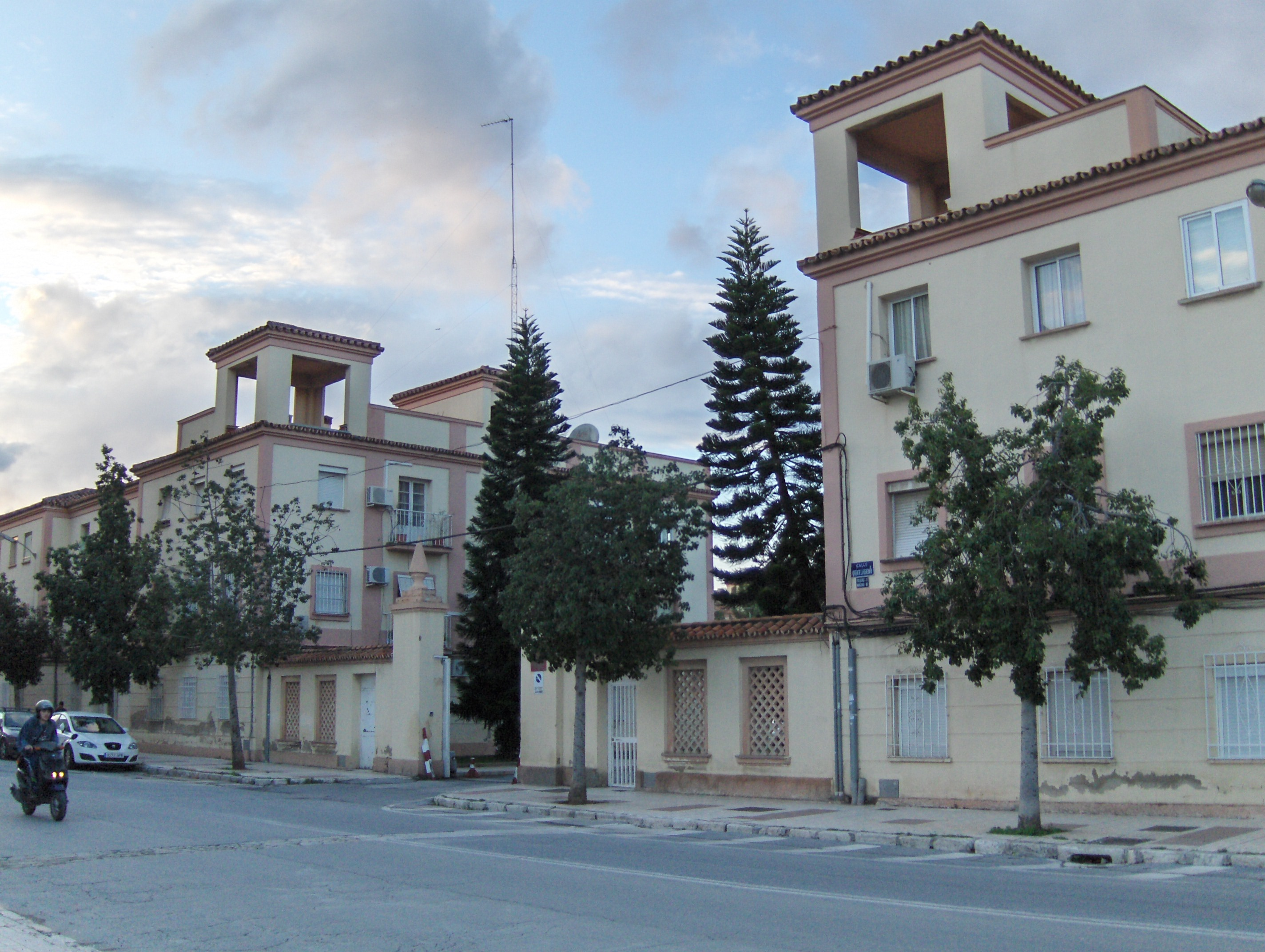 Barrio de CArranque, Málaga, España.